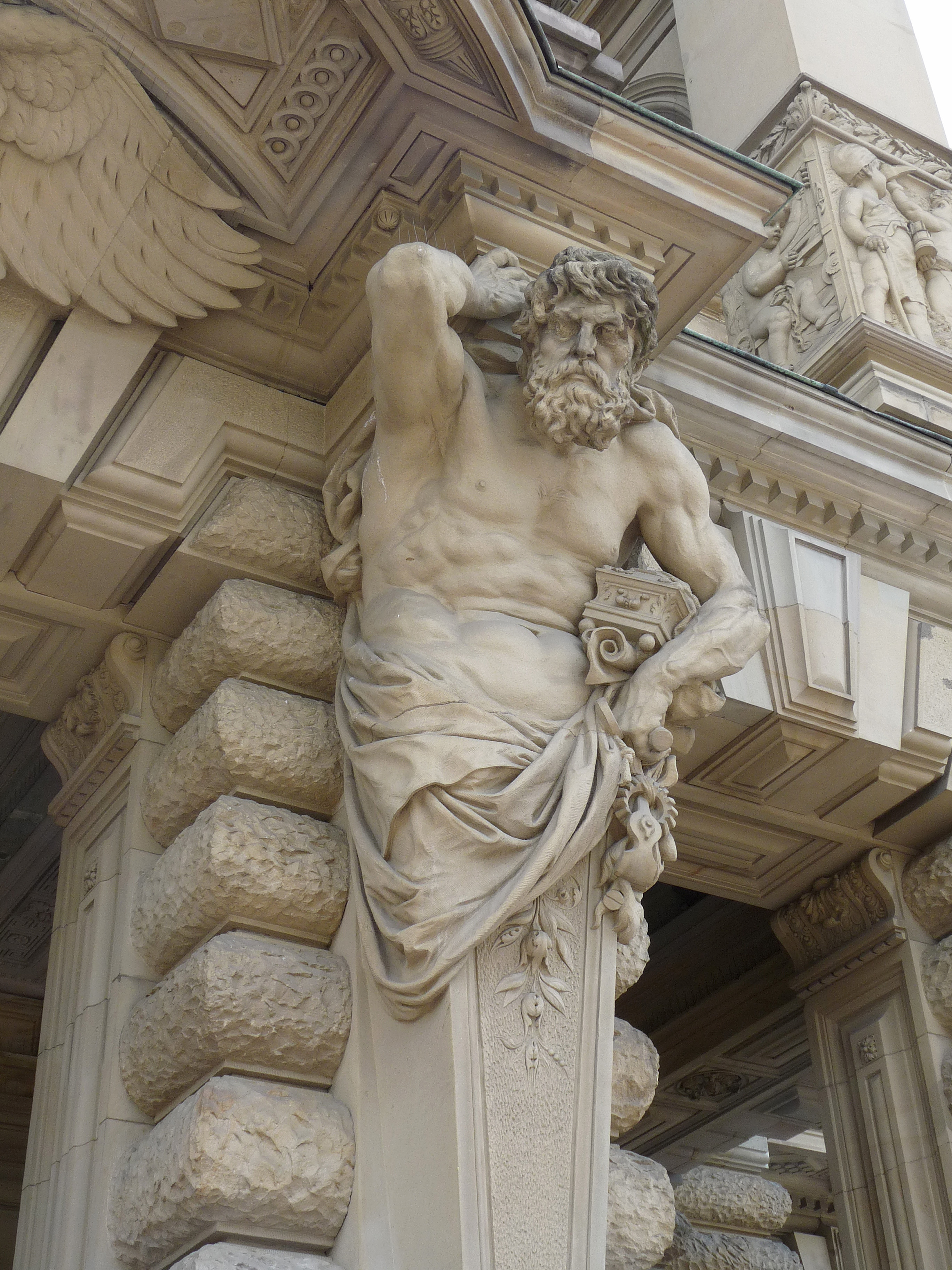 Strasbourg : Palais du Rhin